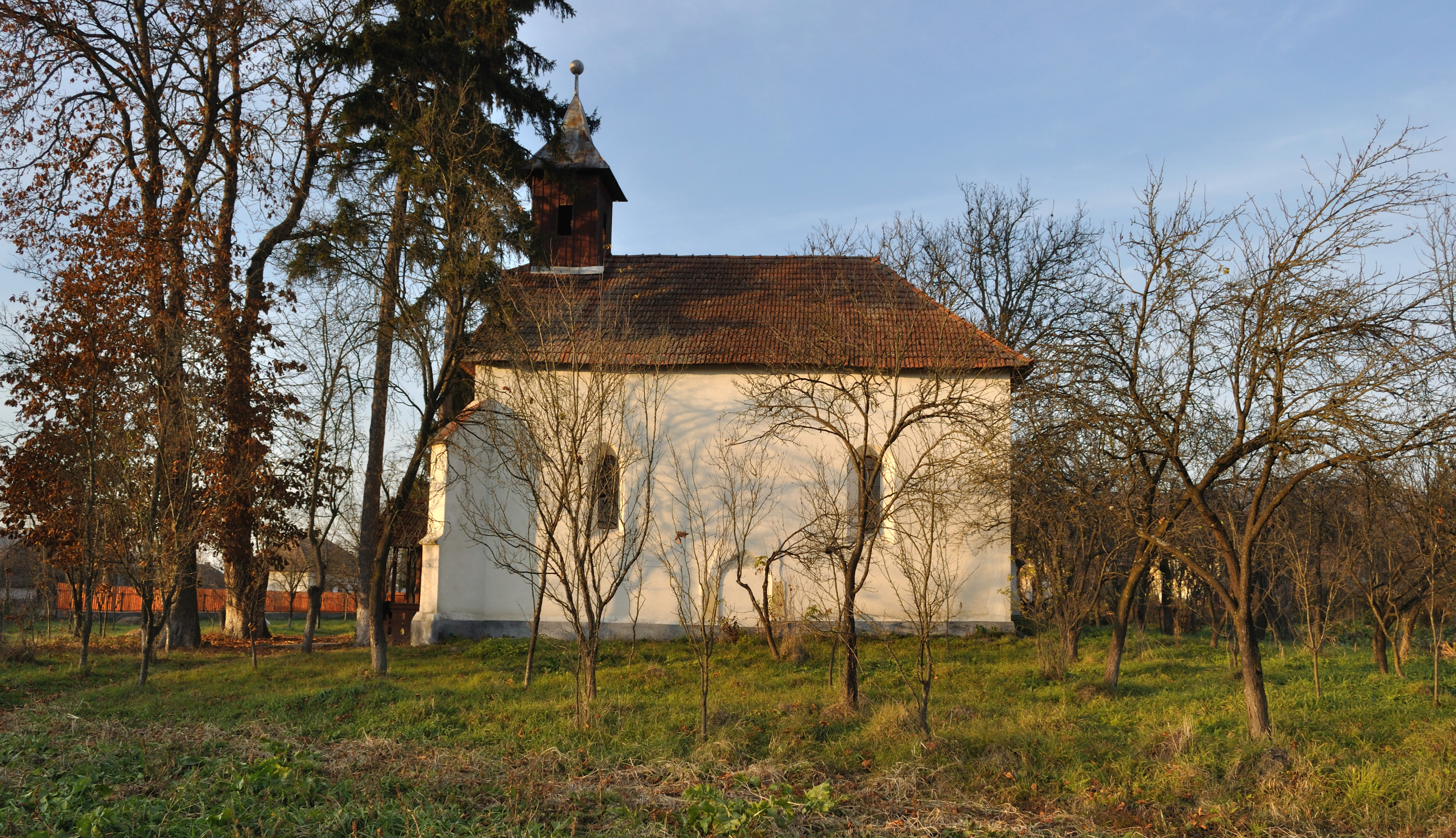 Biserica reformată din Stoiana, județul Cluj